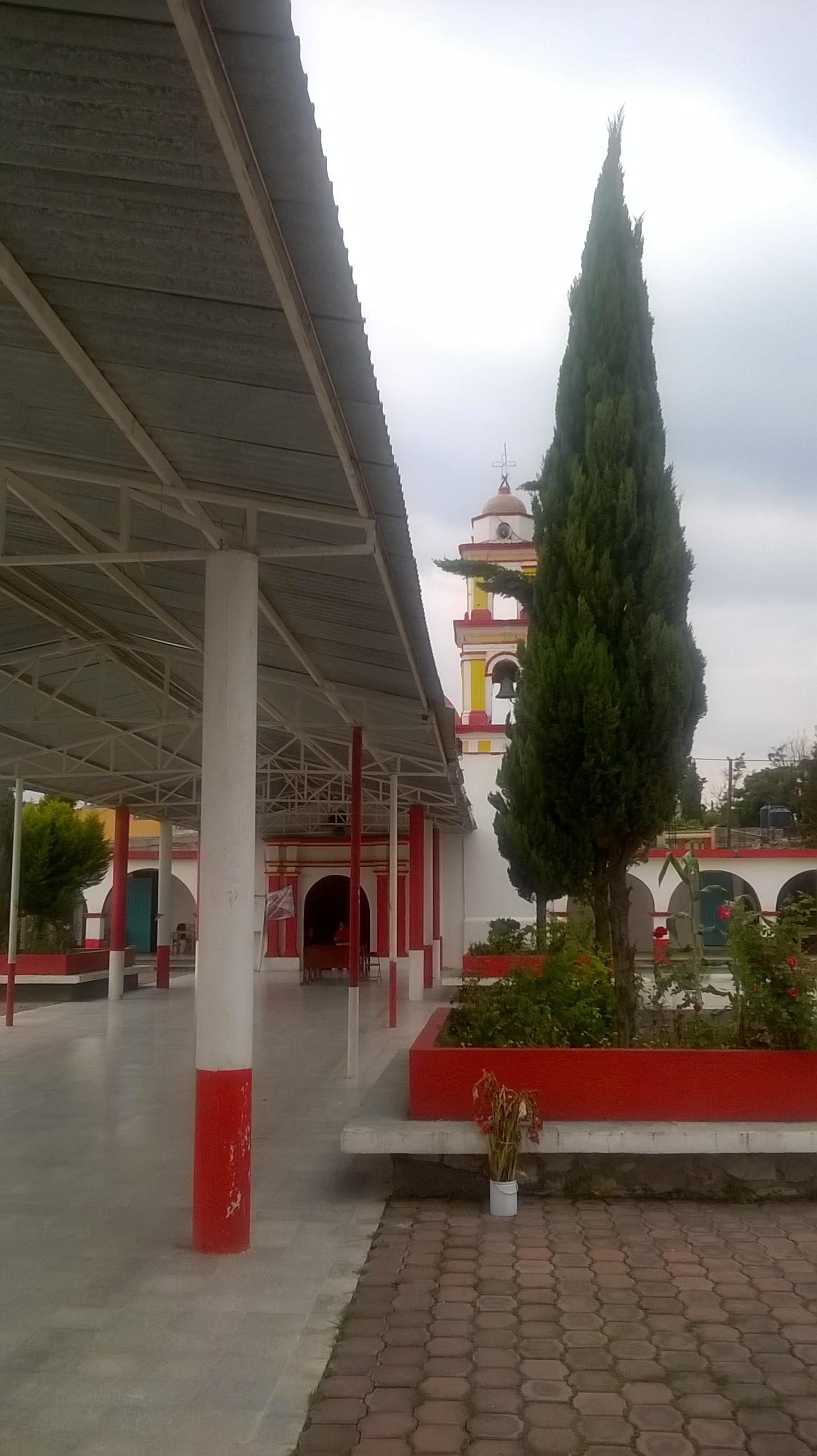 Iglesia de San Vicente Xiloxochitla, Tlaxcala